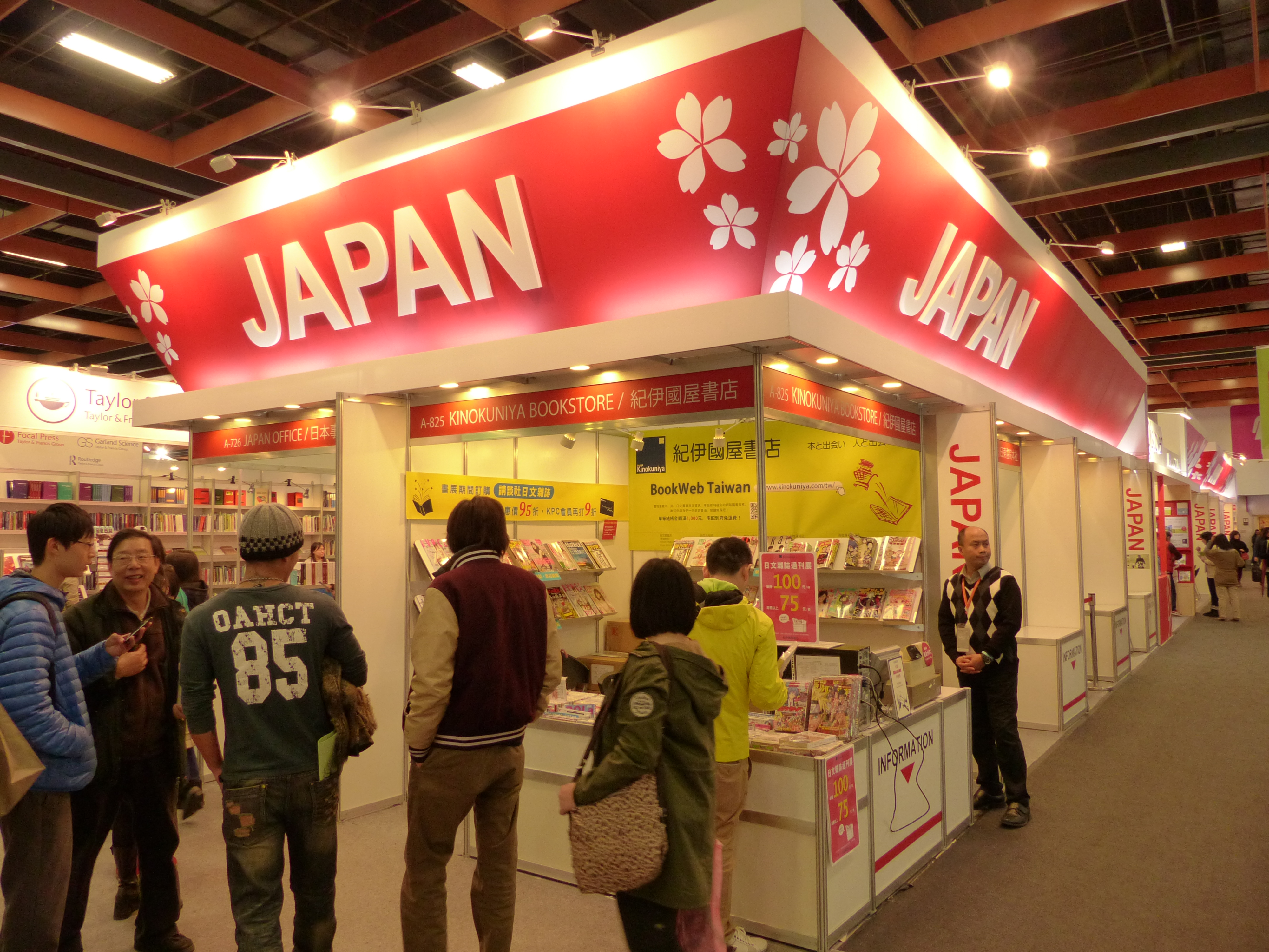 第22屆臺北國際書展，世貿一館日本館紀伊國屋書店攤位。